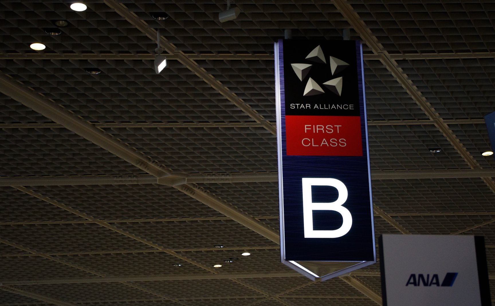 Narita Airport